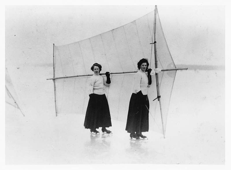 Skridskosegling på is. Två kvinnor i tidens sportkläder, långa kjolar och polotröjor, och på skridskor håller gemensamt upp ett skridskosegel bakom sig.